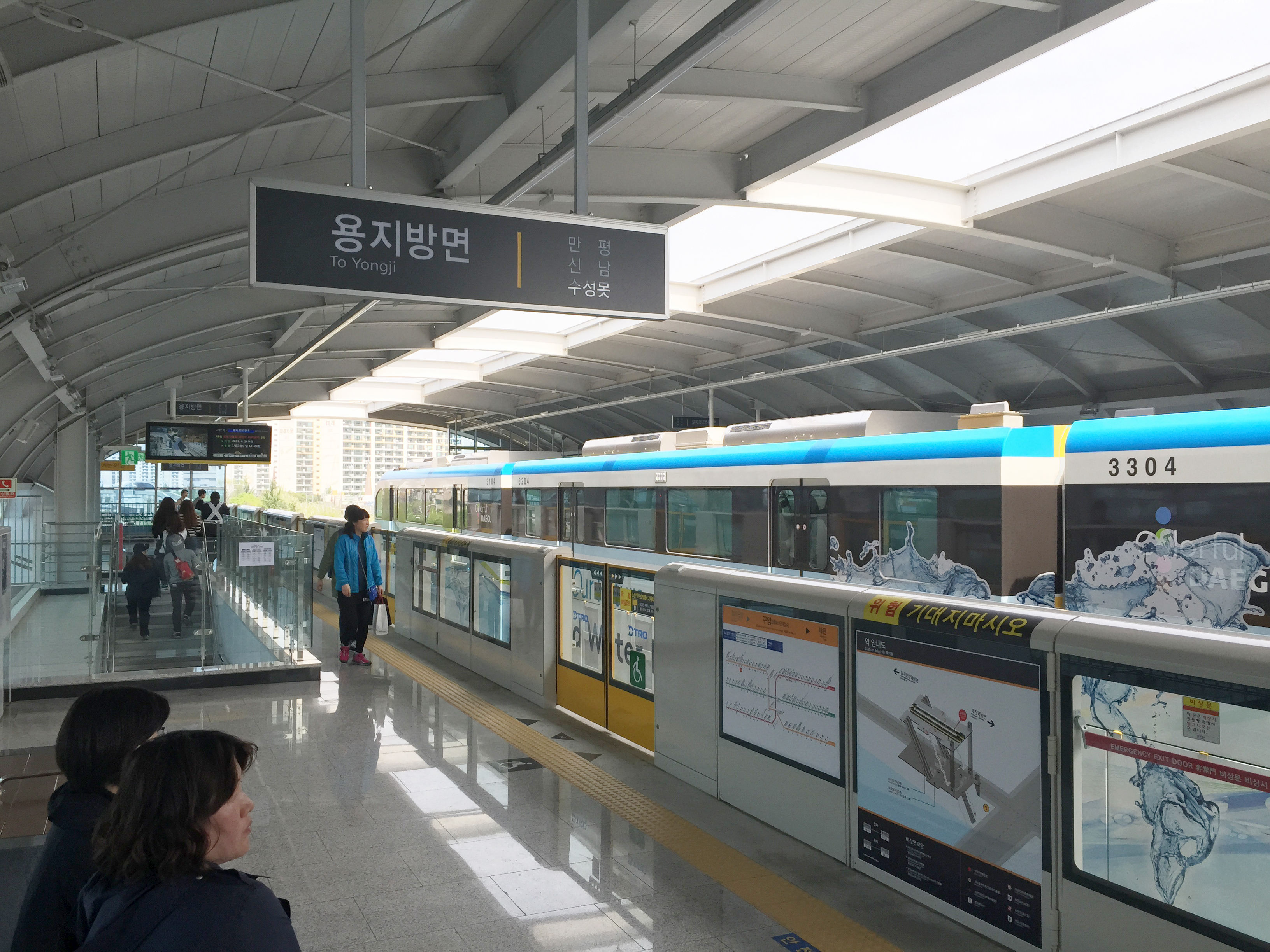 구암(과학대·보건대입구)역 승강장